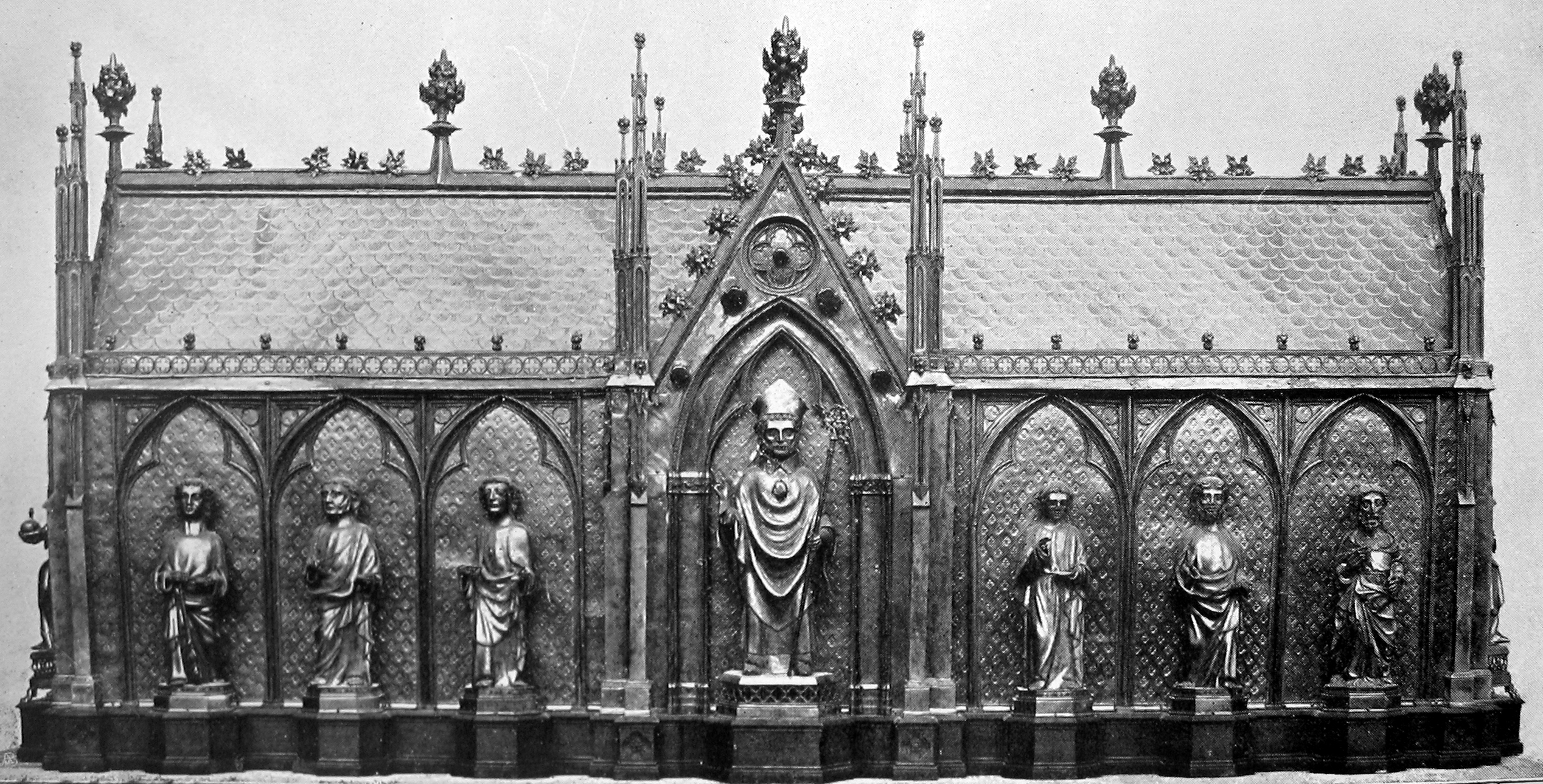 Soest, Dom, Patroklusschrein (Ludorff)